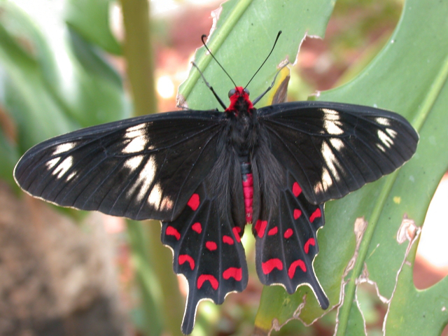 Crimson Rose adult pachliopta hector